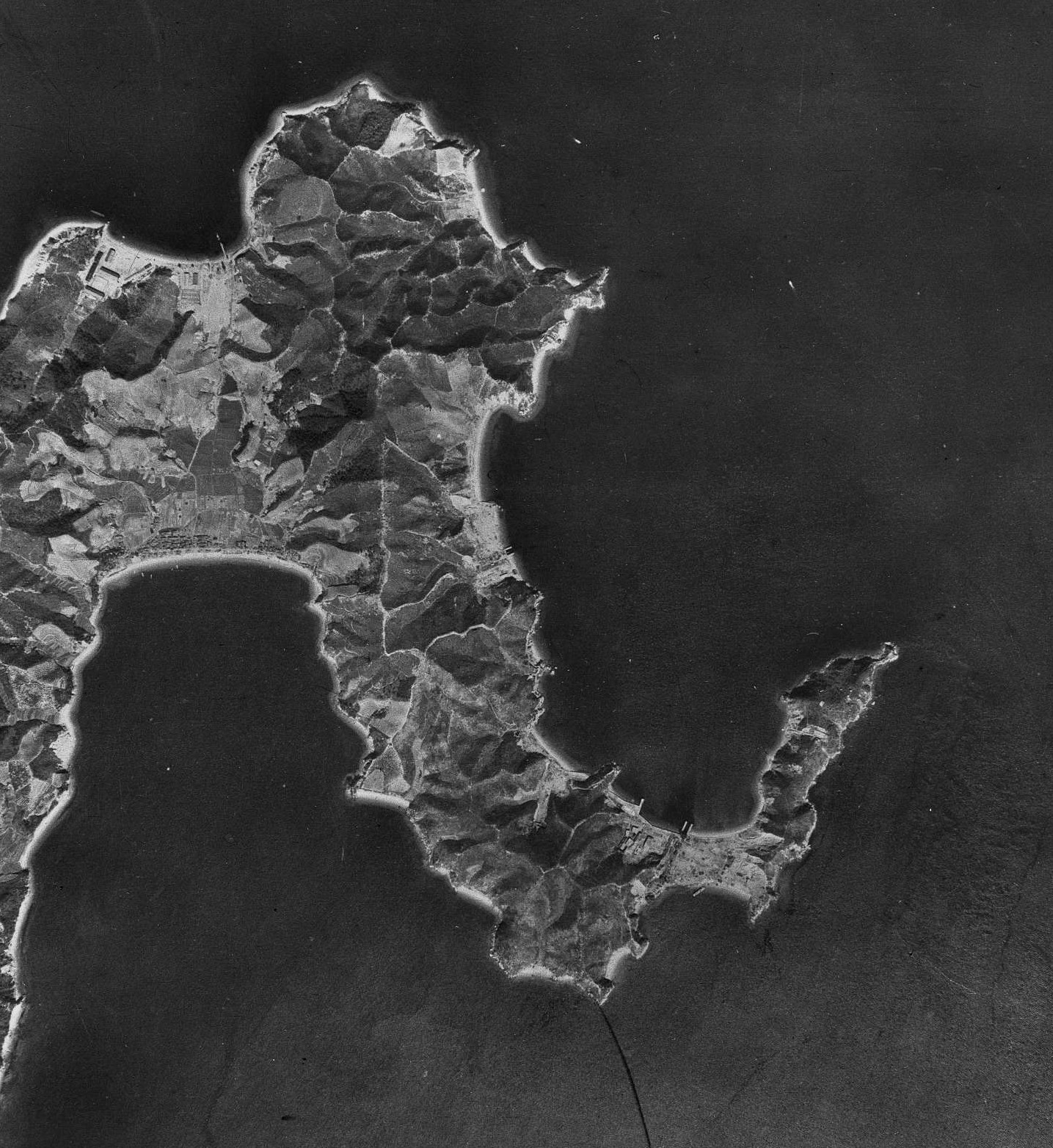 1947年広島県の倉橋島亀ヶ首